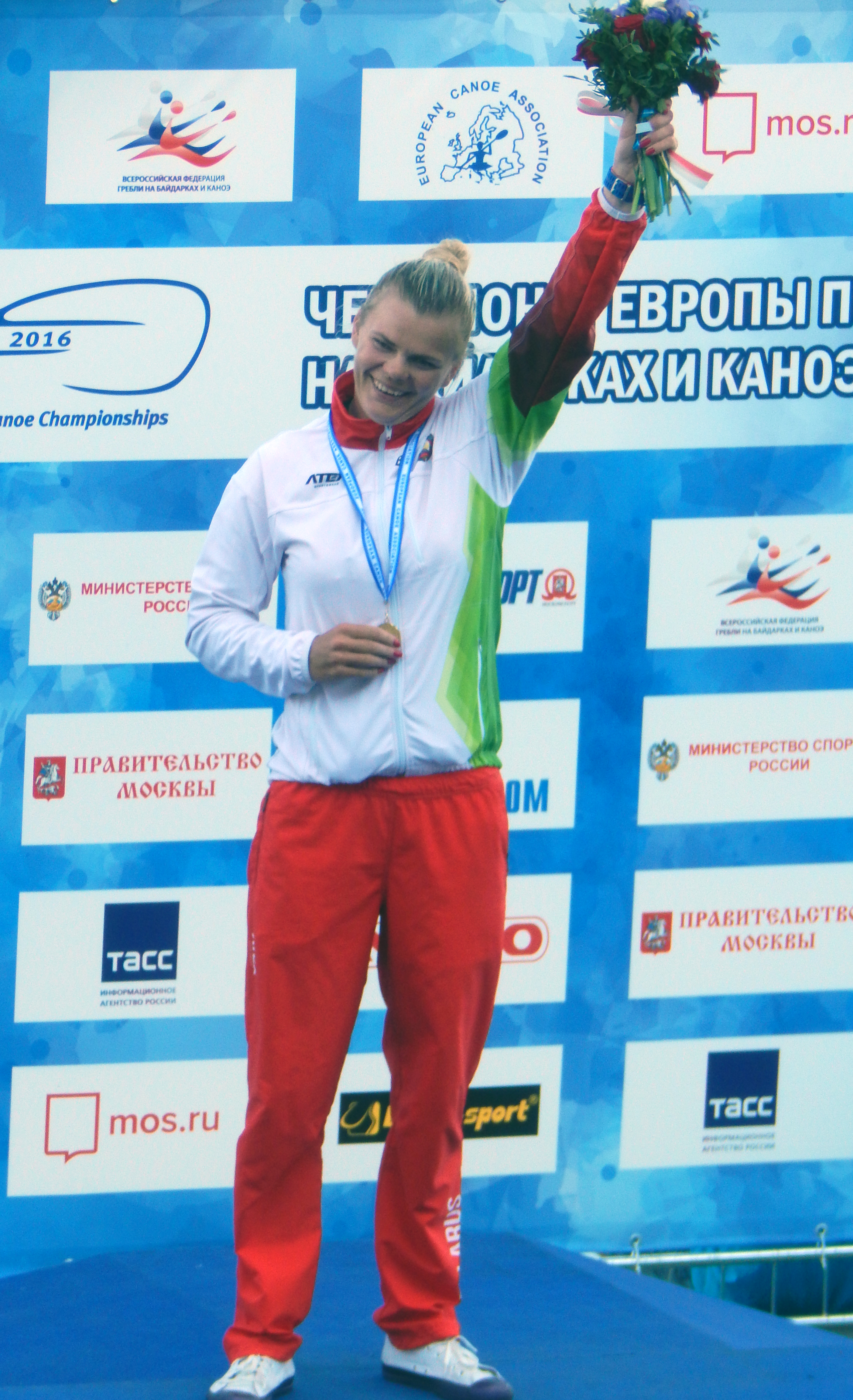 Чемпионат Европы по гребле на байдарках и каноэ 2016. Белорусская гребчиха-байдарочница Марина Литвинчук, чемпионка Европы на дистанции 5000 метров